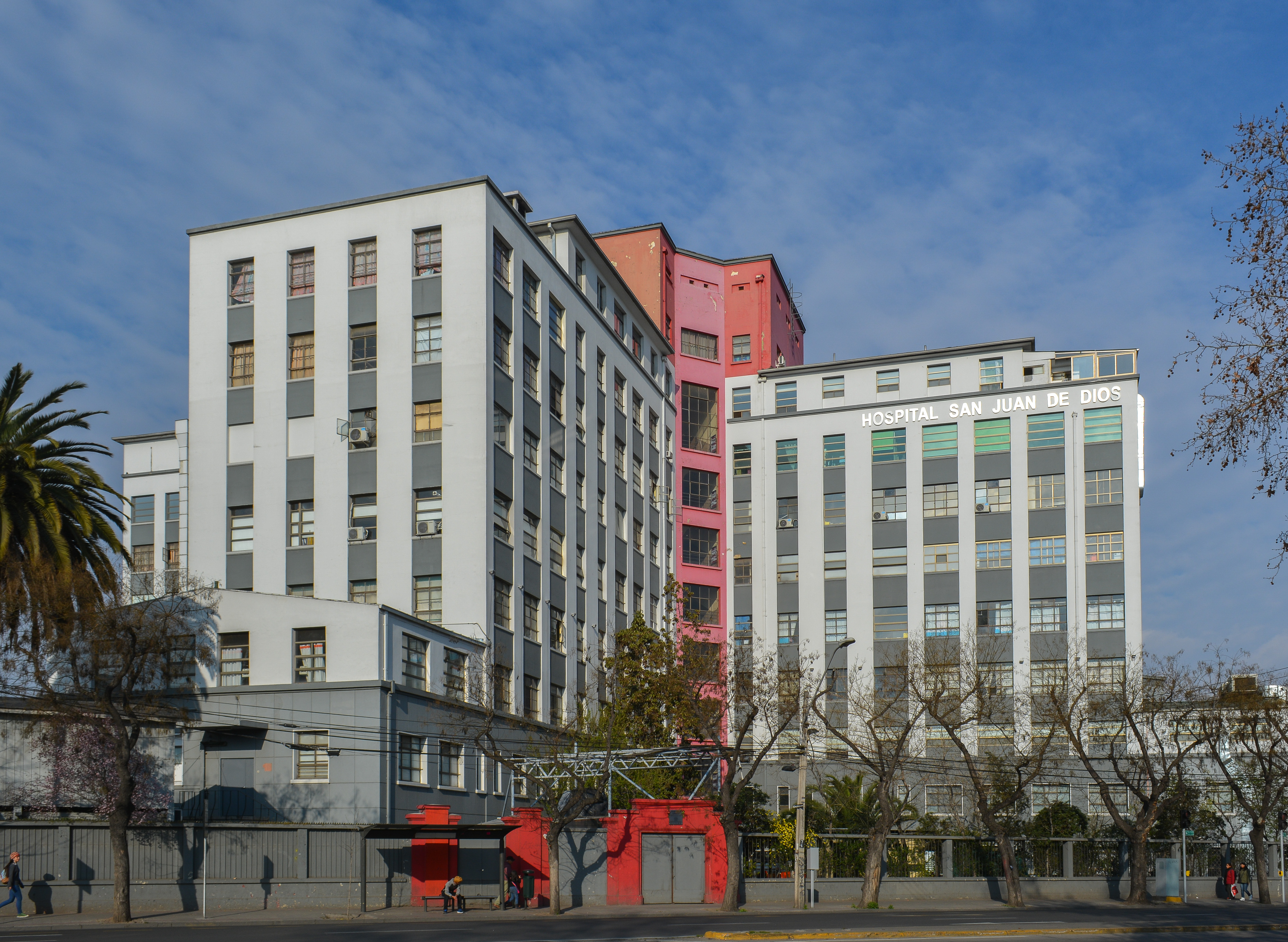 Hospital San Juan de Dios, Santiago, Chile